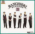 A Banchieri Énekegyüttes 1996-os CD-lemeze